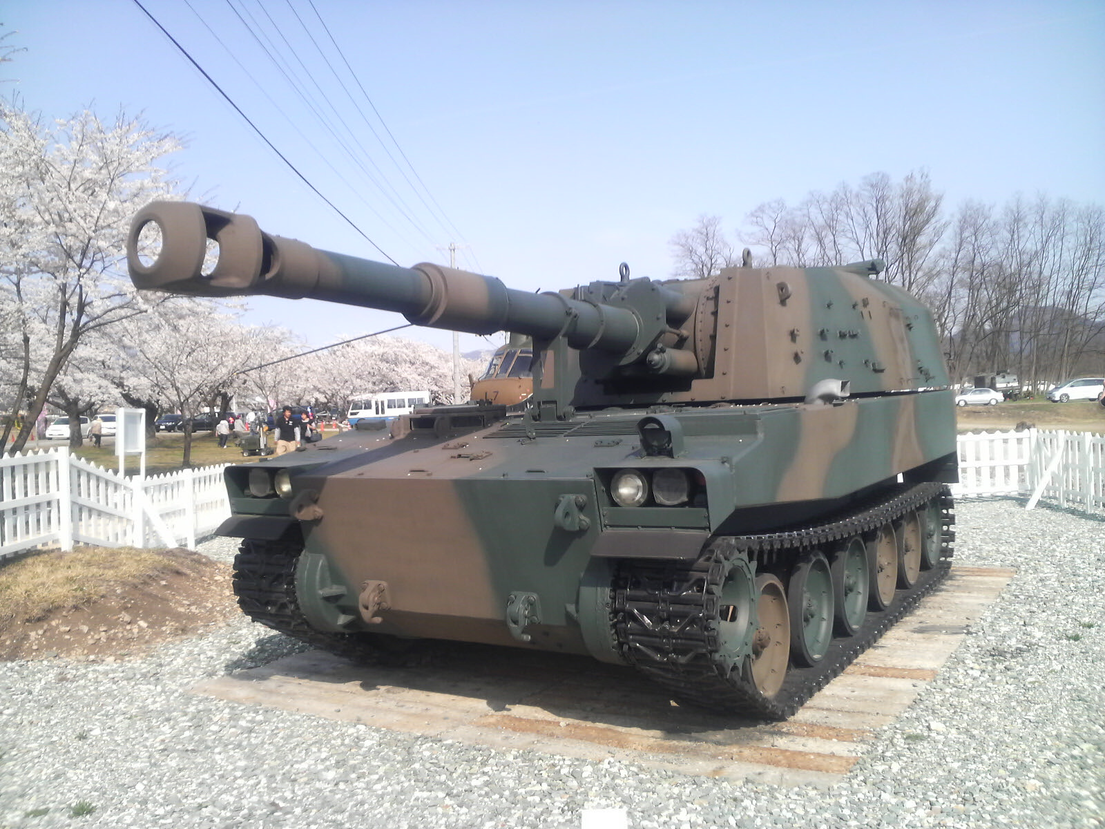 山形県東根市の陸上自衛隊神町駐屯地敷地内に展示される75式自走155mmりゅう弾砲。